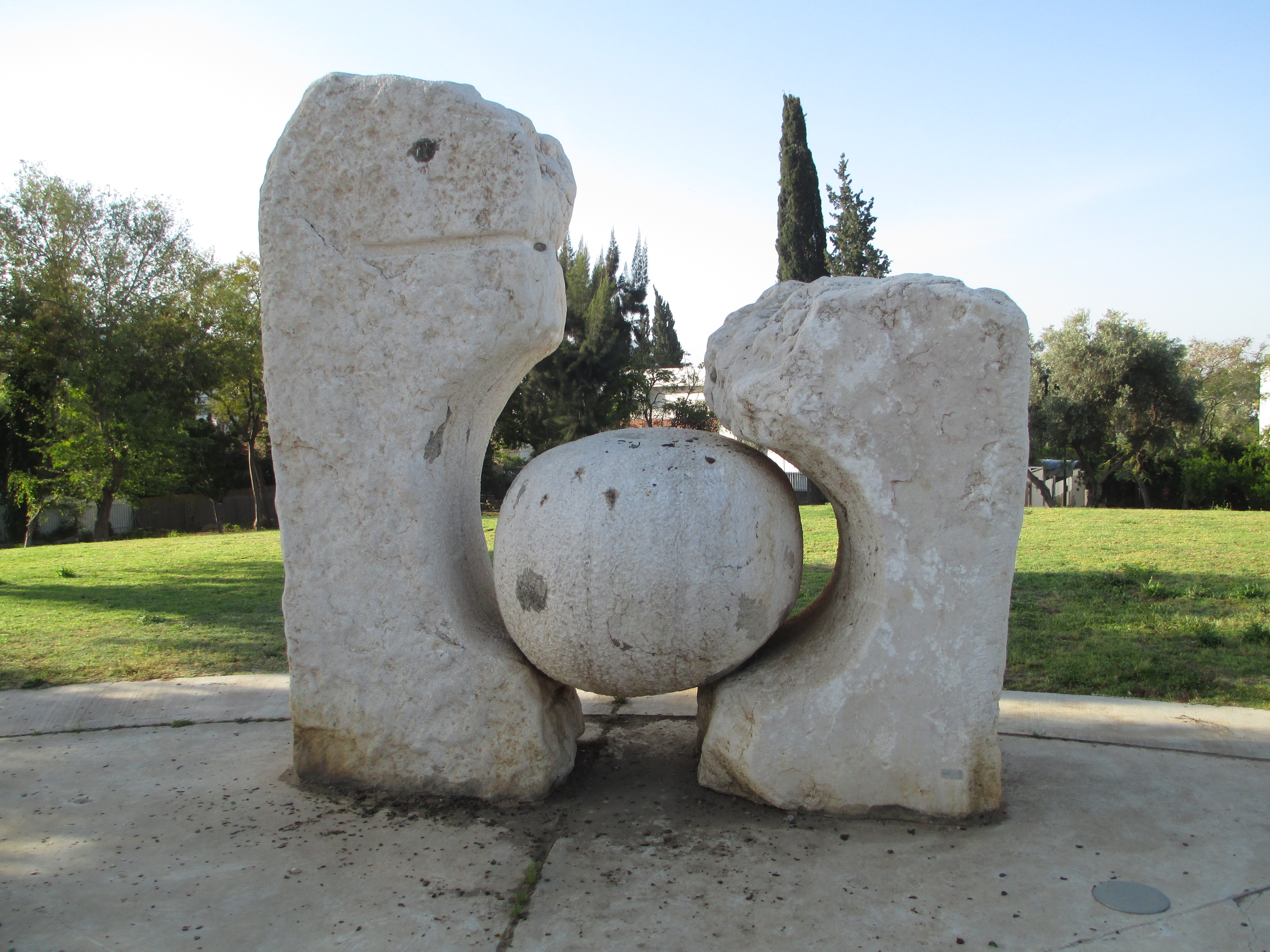 הפסל פוריות של מתניה אברמסון (1980) בתל אביב